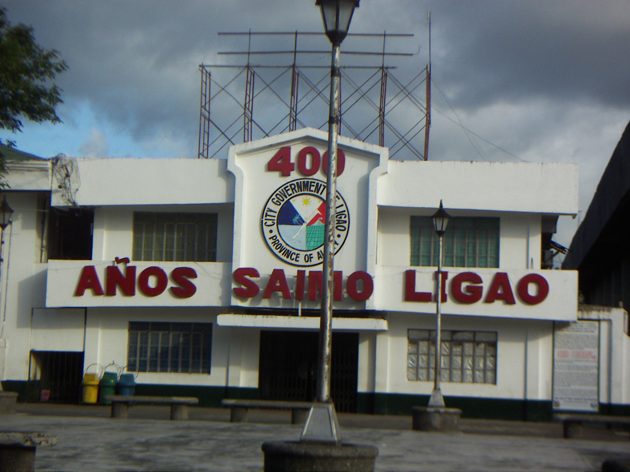 Ligao, Albay, Philippines